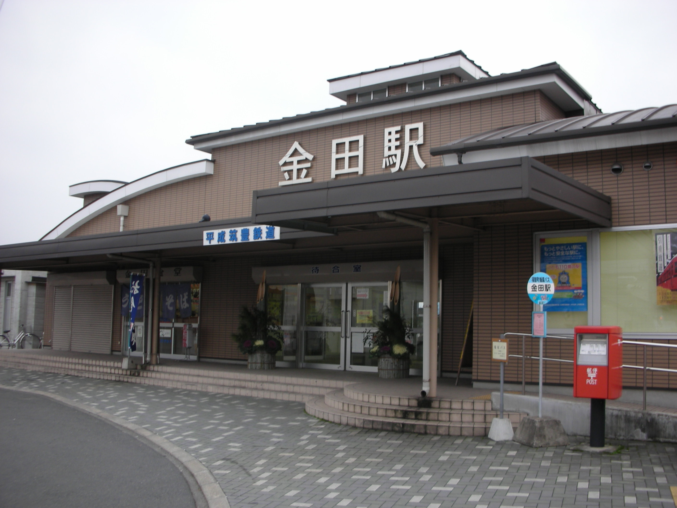 2006/12/26におんさか自身が撮影。金田駅。